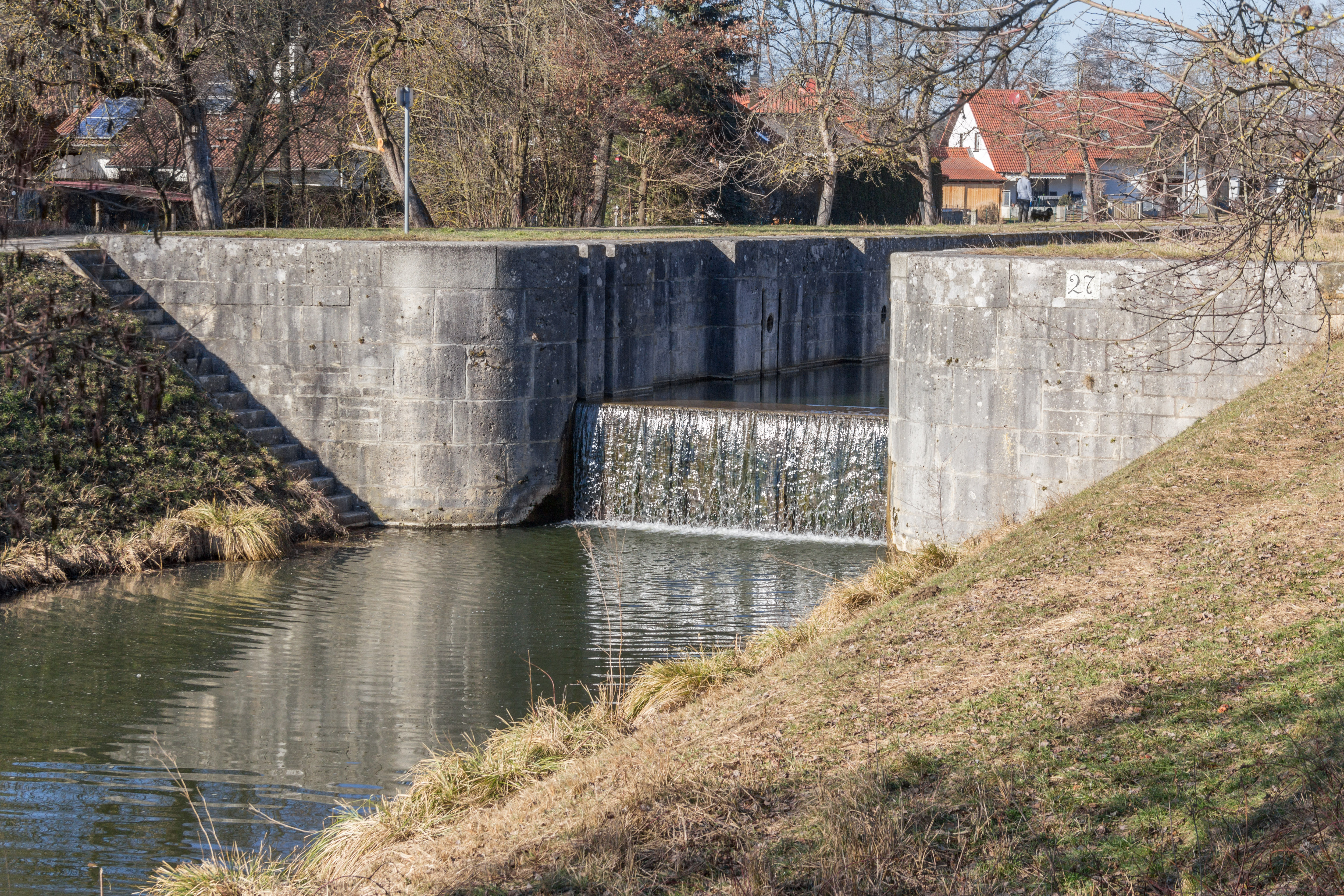 Ludwig-Donau-Main-Kanal, Schleuse 27